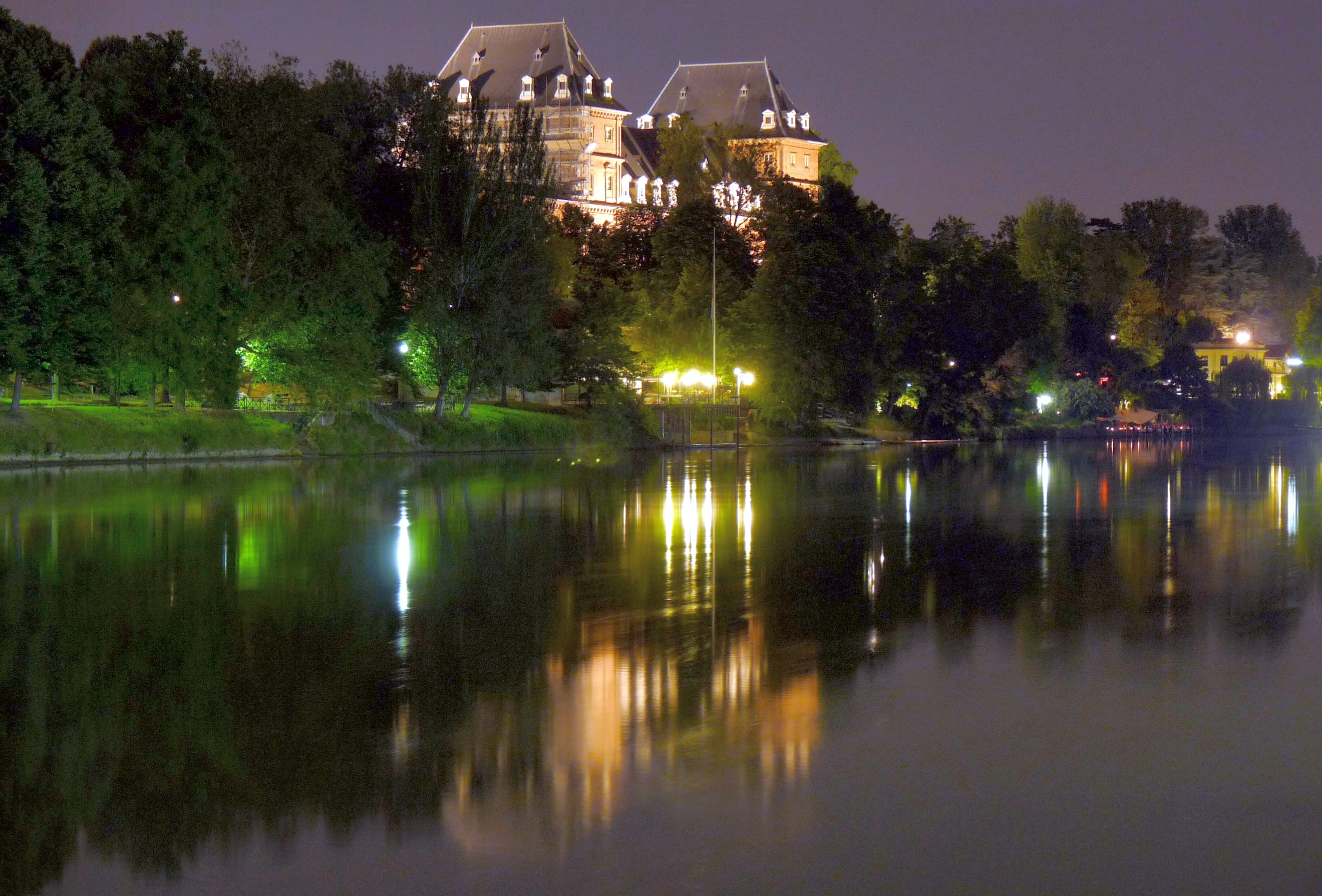 Castello del Valentino